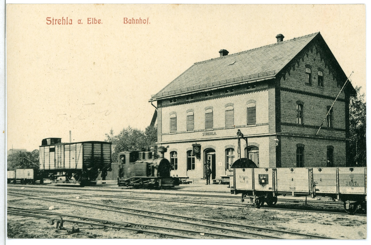 Strehla; Bahnhof This postcard is from publisher Brück & Sohn in Meißen ( postcard has a unique number 10192 and is available in a higher resolution at the publisher. This images was uploaded in a cooperation project between Wikipedians and the publisher.